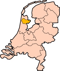 Ligging van de regio West-Friesland op de kaart van Nederland.